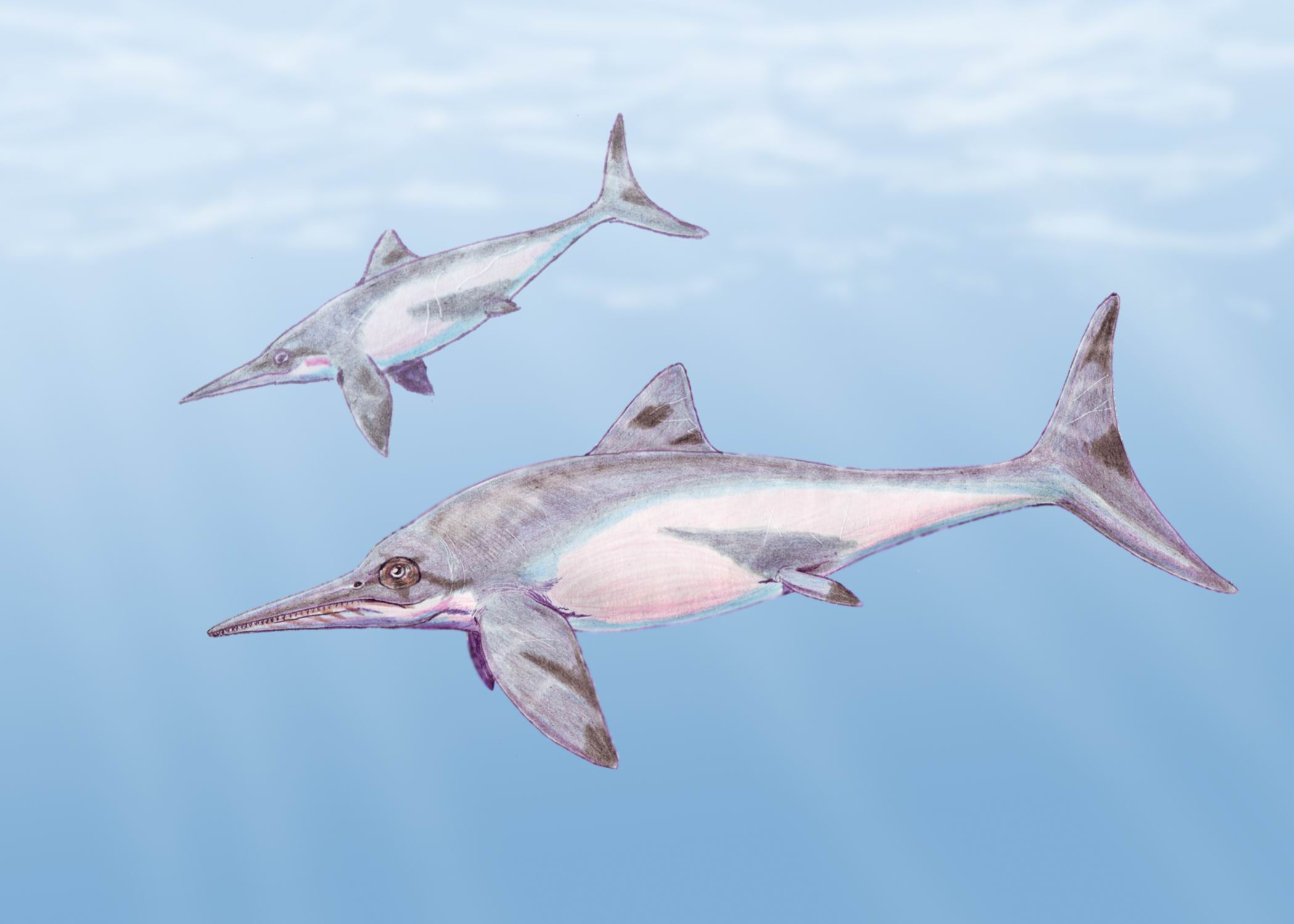 Platypterygius kiprjianovi